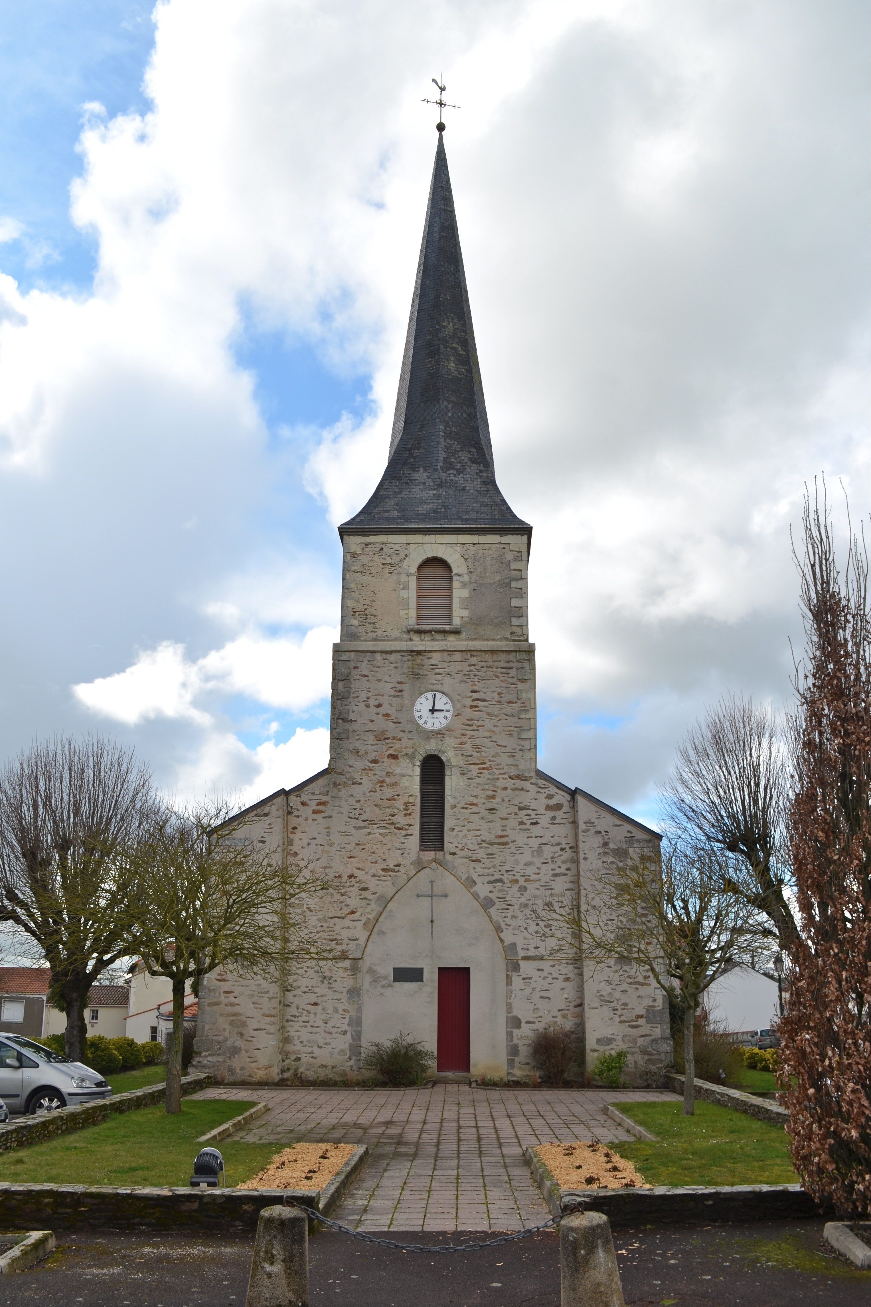 Clocher isolé de Saint-Étienne-de-Mer-Morte - Loire-Atlantique